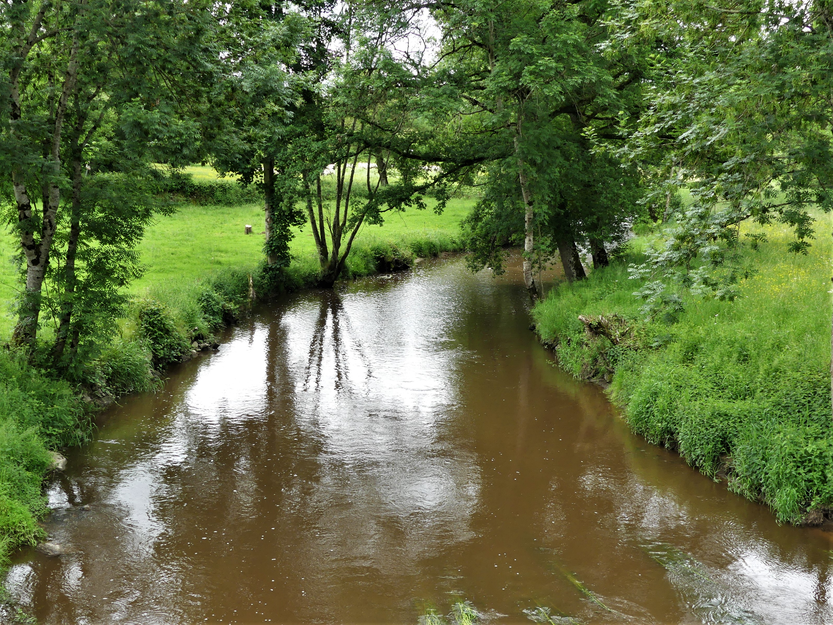 La Tardes au pont de Bonlieu, Saint-Priest, Creuse, France. Vue prise en direction de l'amont.